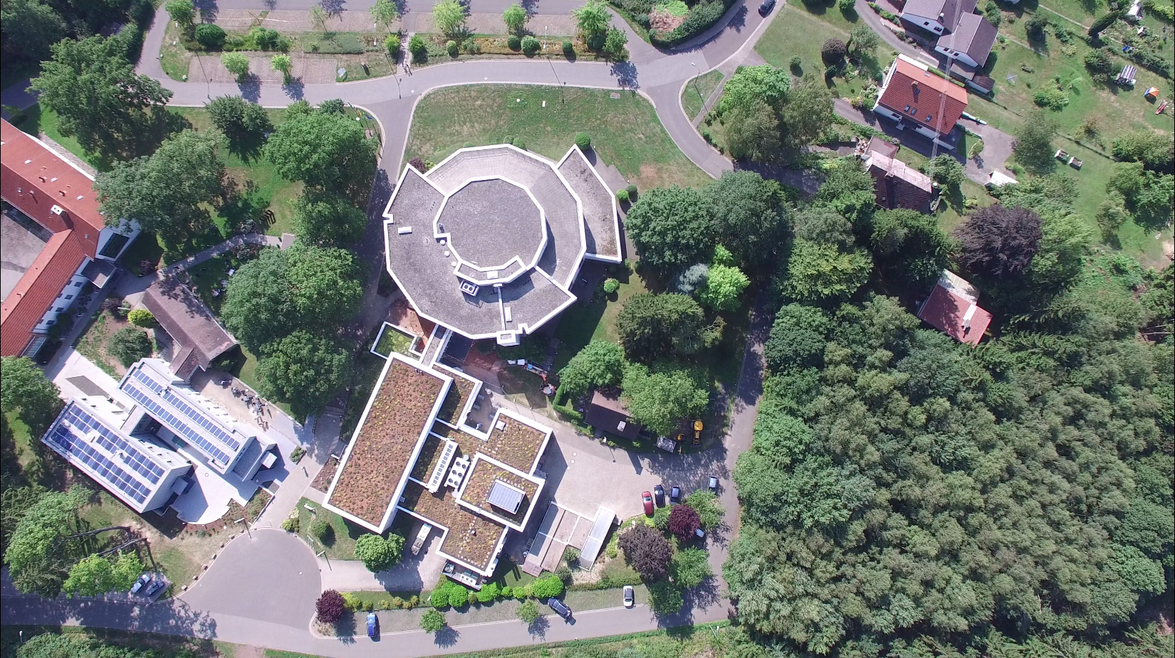 Das Luftbild zeigt die EAO von oben, Stand: August 2015